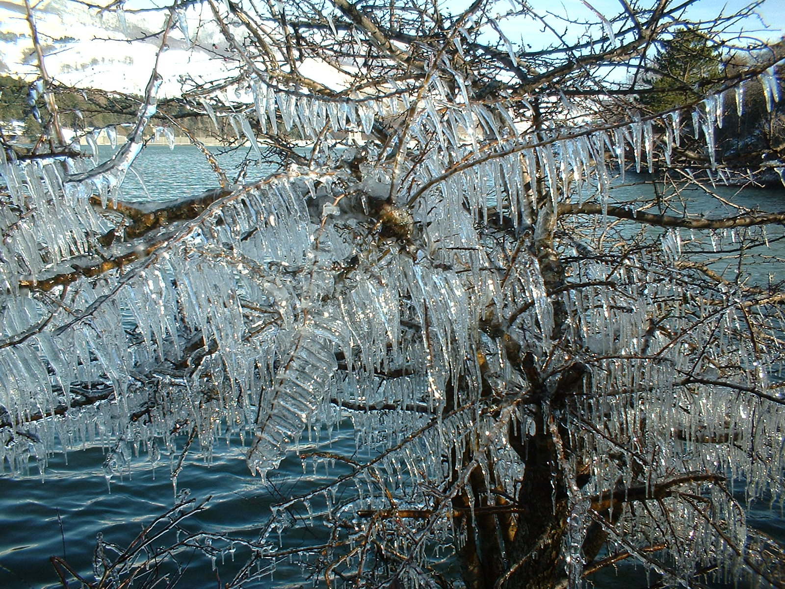 Nebbia levatasi dal lago (che si vede sullo sfondo). La giornata soleggiata ha poi parzialmente fuso il ghiaccio che si è nuovamente formato (dando luogo ai piccoli ghiaccioli) quando si è alzato il vento.